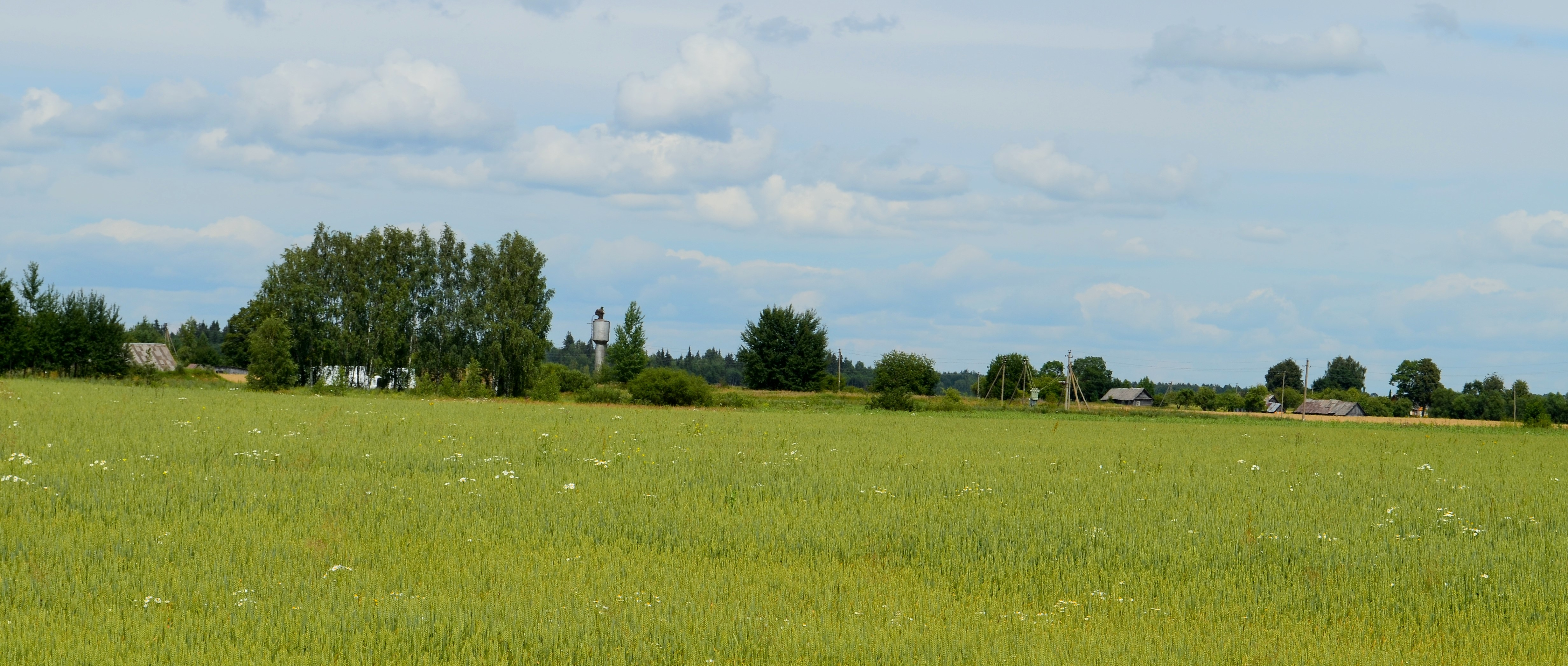 Miliūnai, Ukmergės raj.